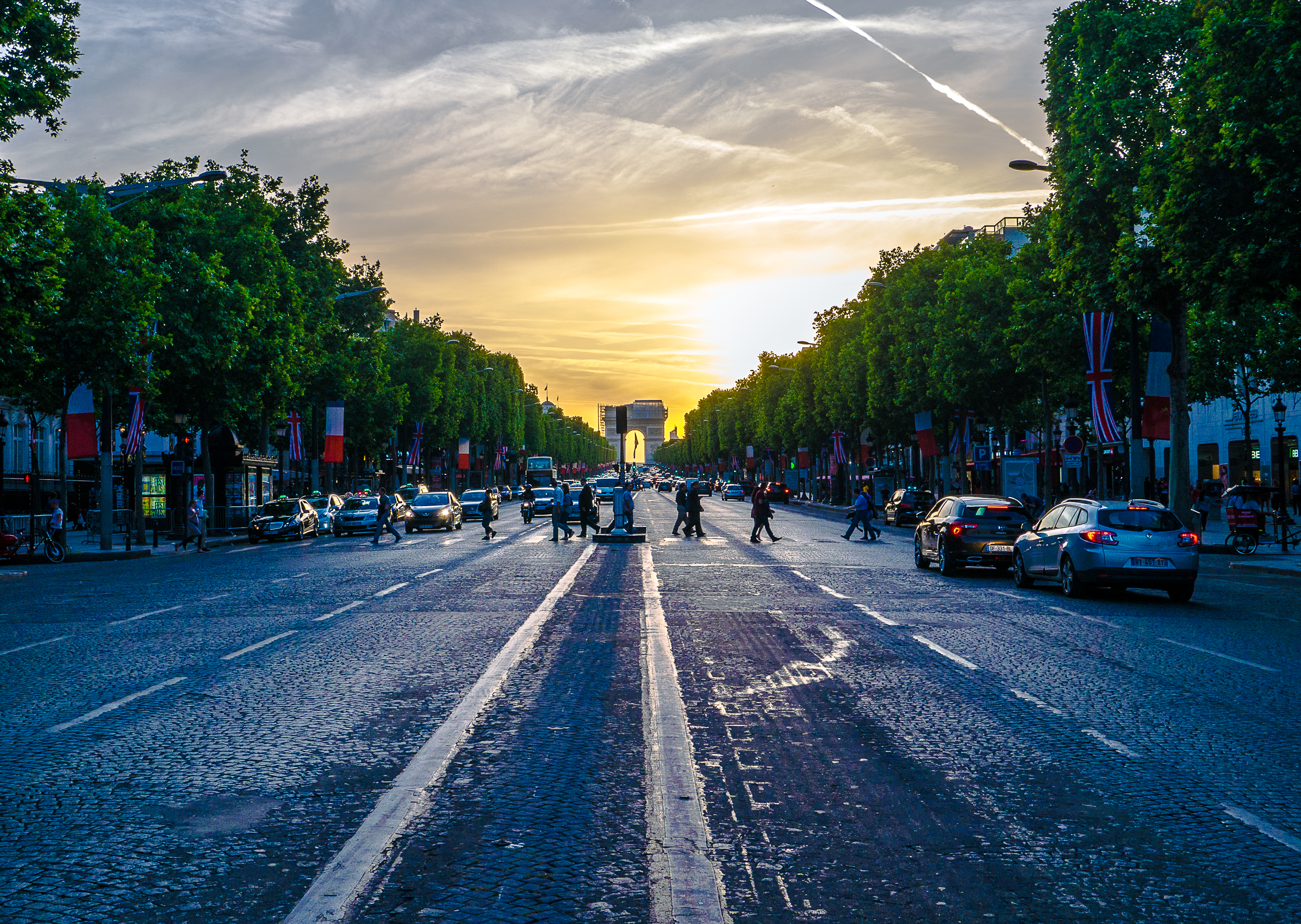 Les Champs Elysées et l'Arc de Triomphe - Paris - 6 juin 2014